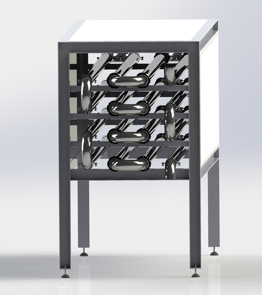 Vue en 3D d'un chambreur utilisé après la pasteurisation